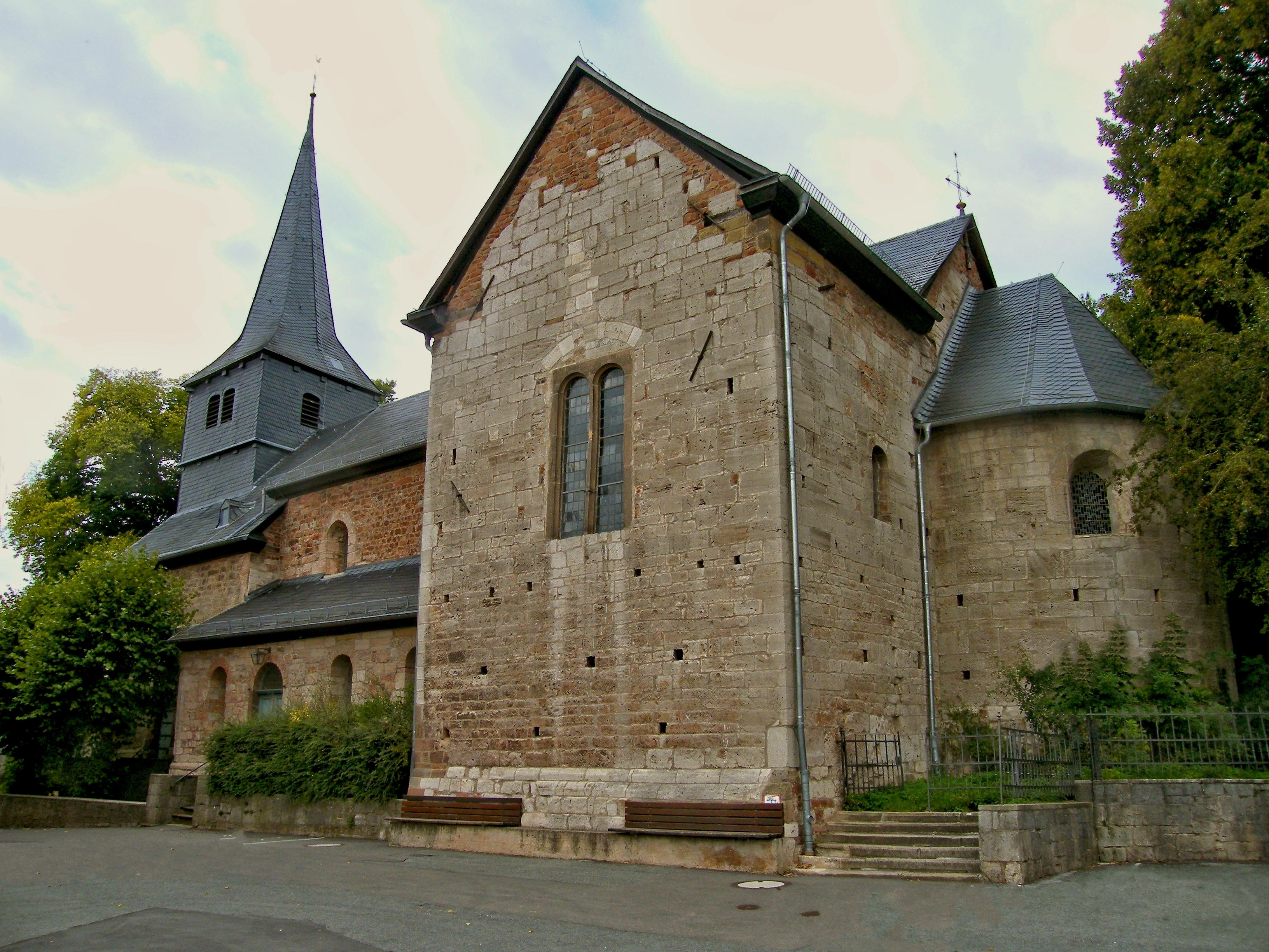 Frühromanische Basilika St. Veith aus dem späten 11. Jahrhundert Twistetal-Twiste